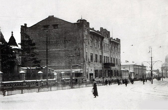 Завод "Красная Застава" (бывший завод братьев Серебряковых)